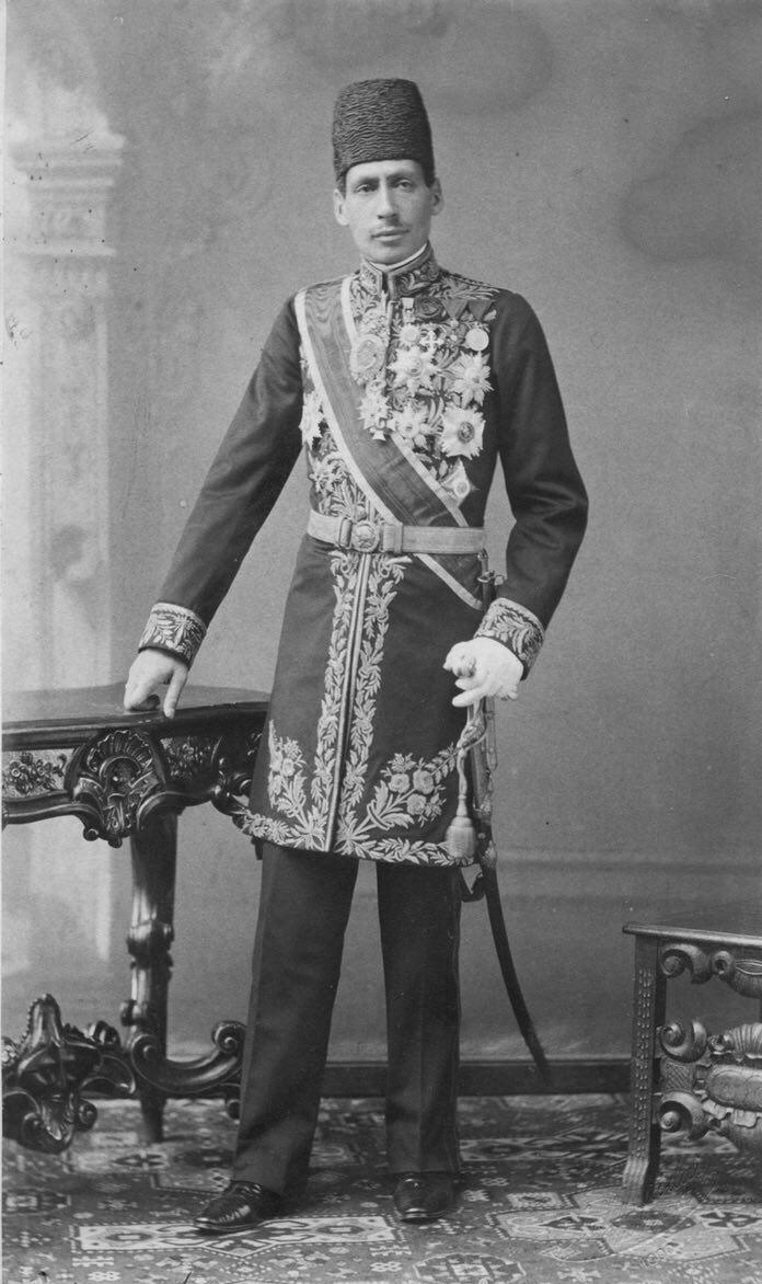 وزیر همایون غفاری، 1318 قمری